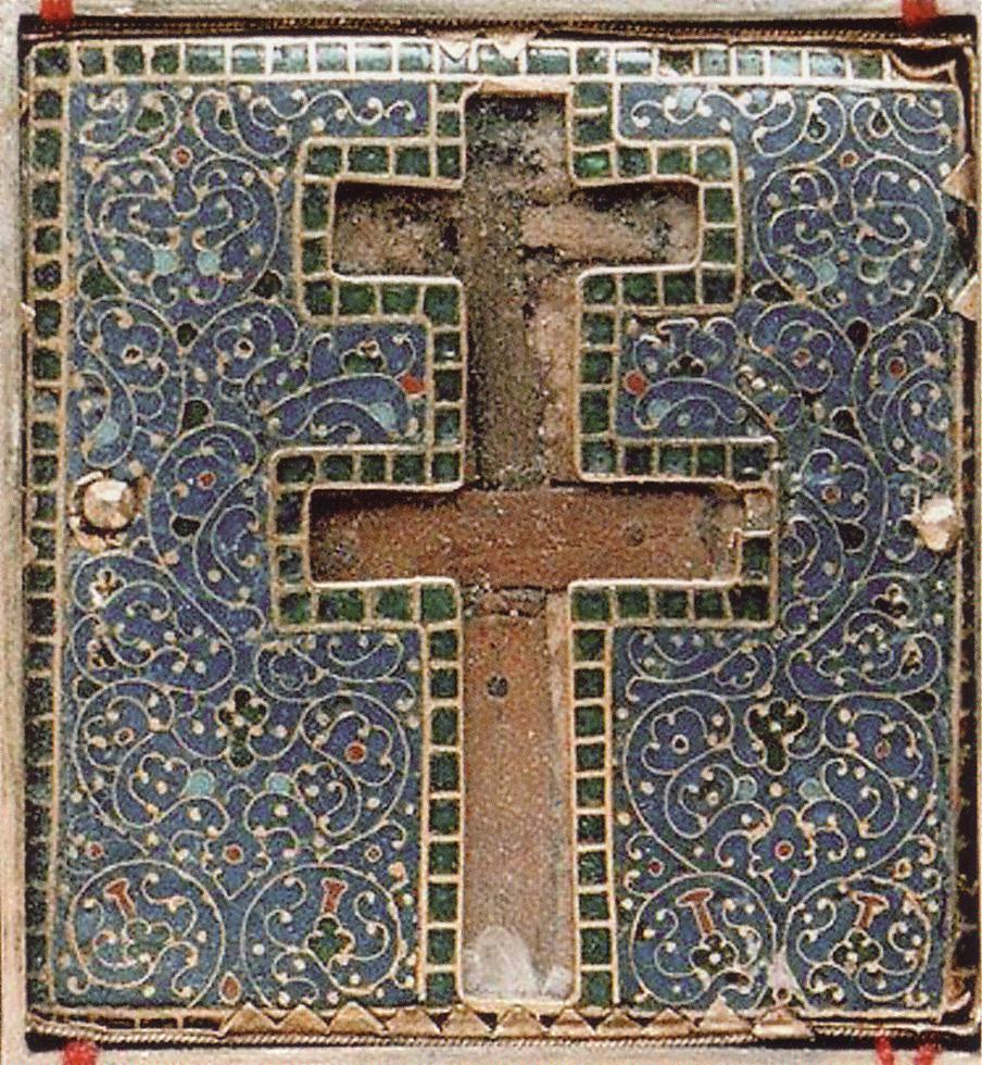 Reliquaire de la sainte Croix de Poitiers. Plaque de cuivre émaillé ornée de la croix patriarcale. Offert par l'empereur de byzance à la reine Radegonde. Abbaye Sainte-Croix de Saint-Benoît.